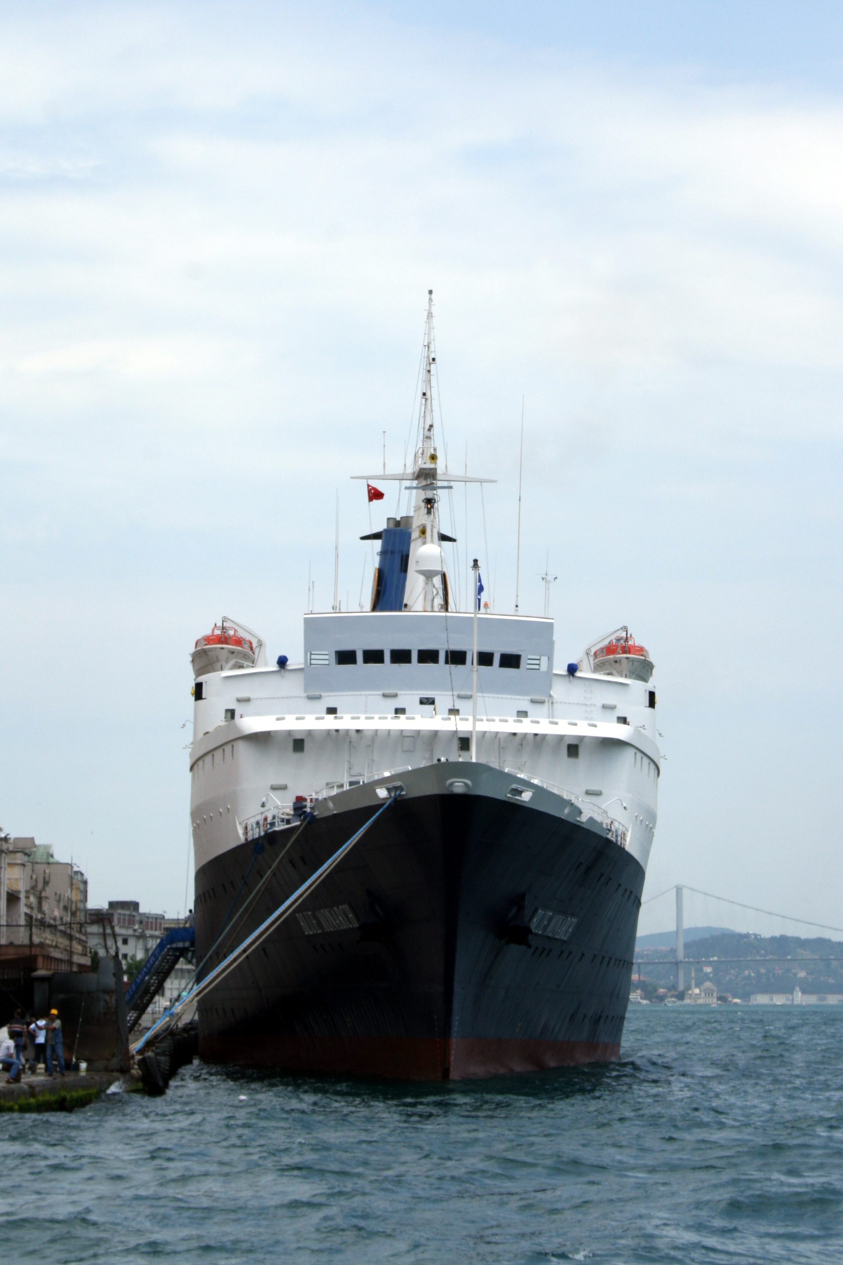 Le Blue Monarch à quai à Istamboul